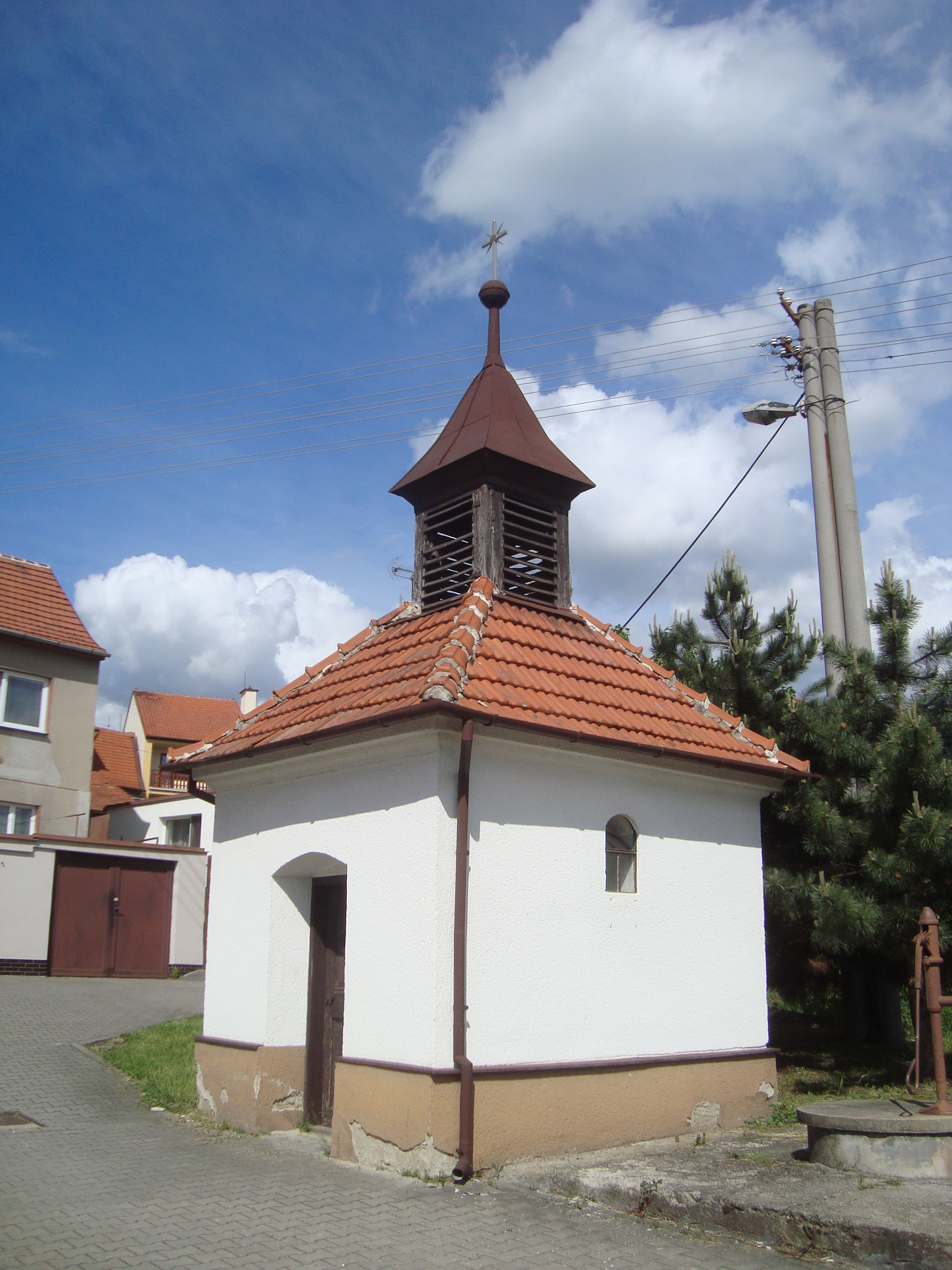 Troubsko-Veselka zvonička